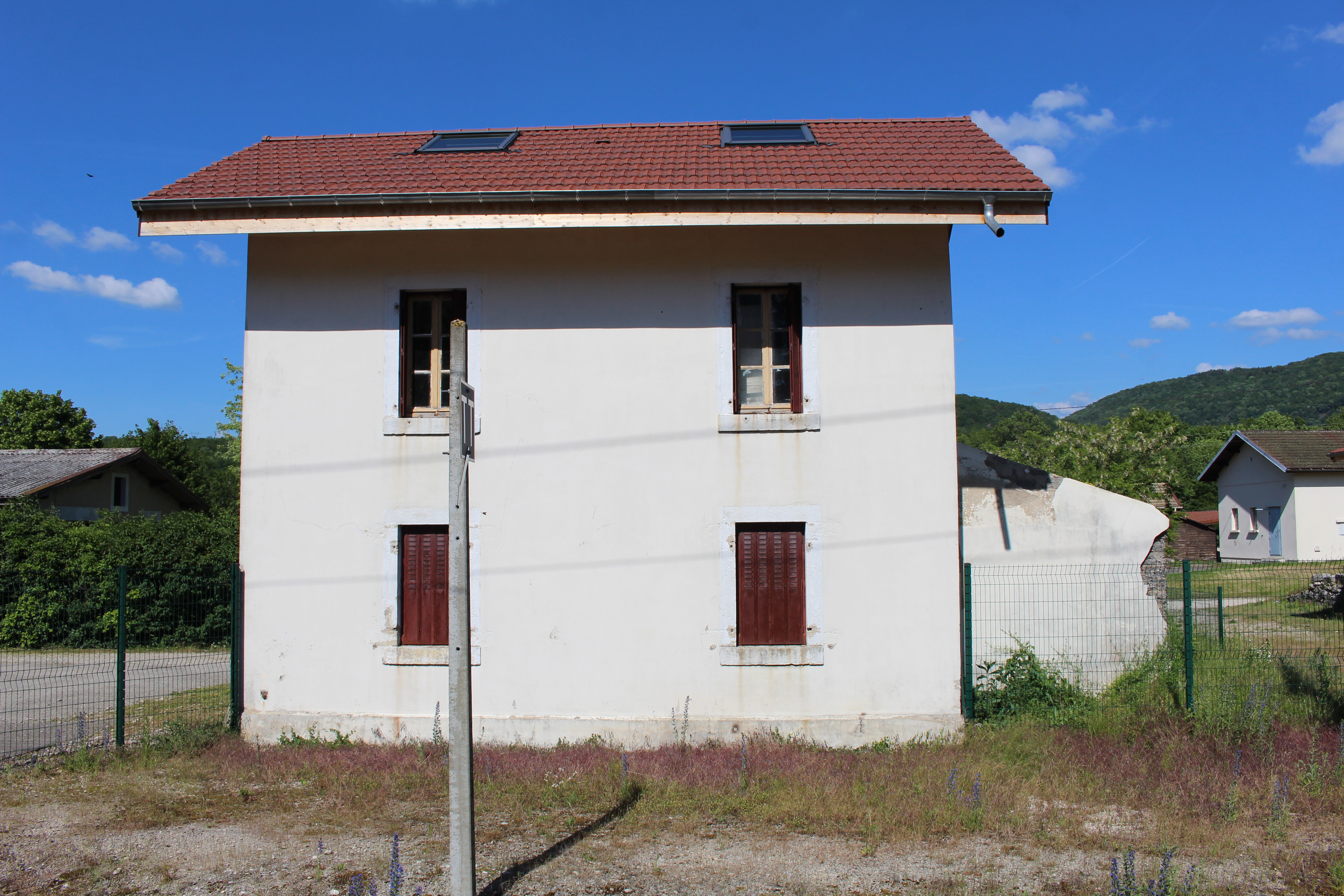 Gare de Cize - Bolozon à Bolozon.